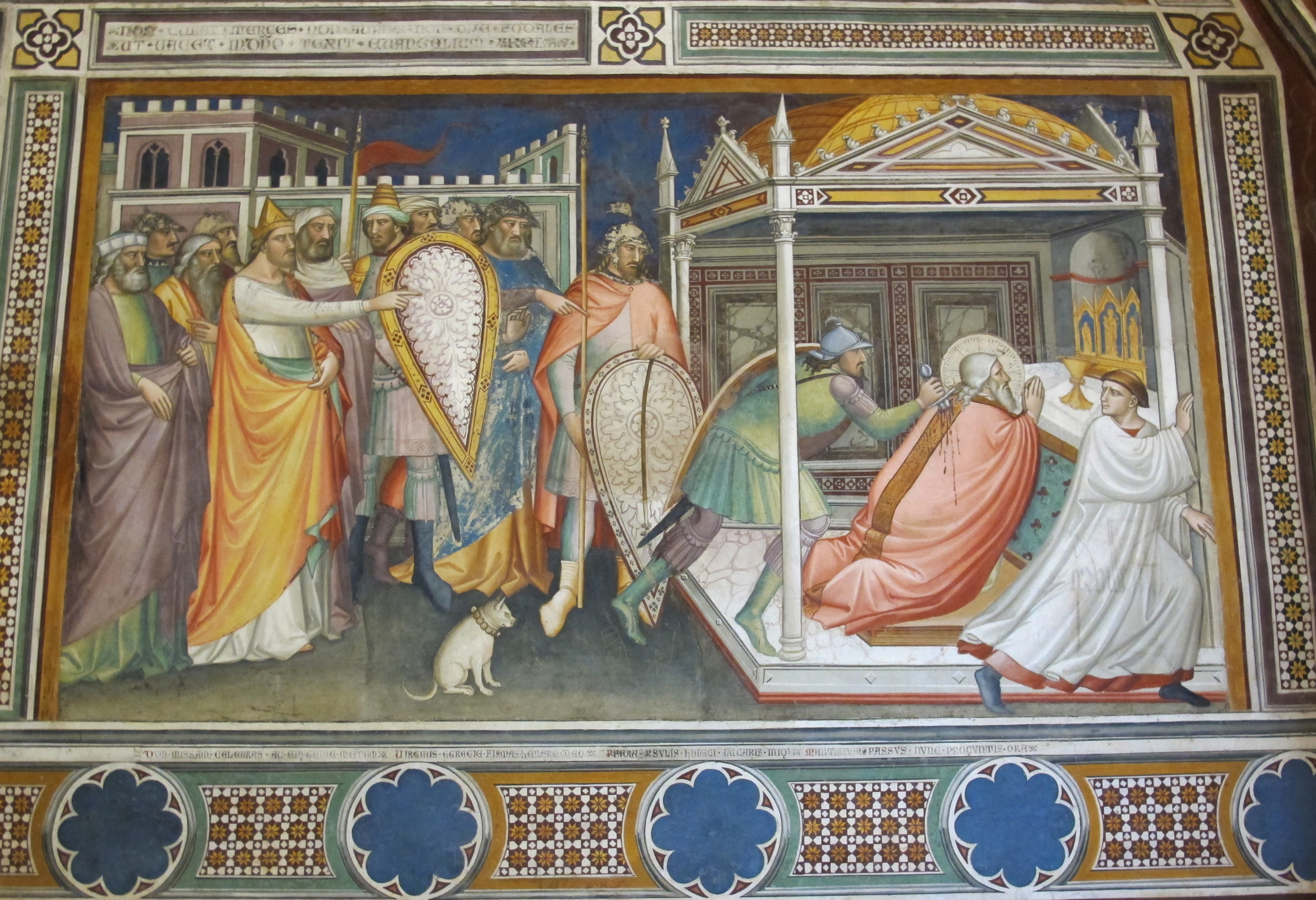 Cappella migliorati 06 storie di san matteo